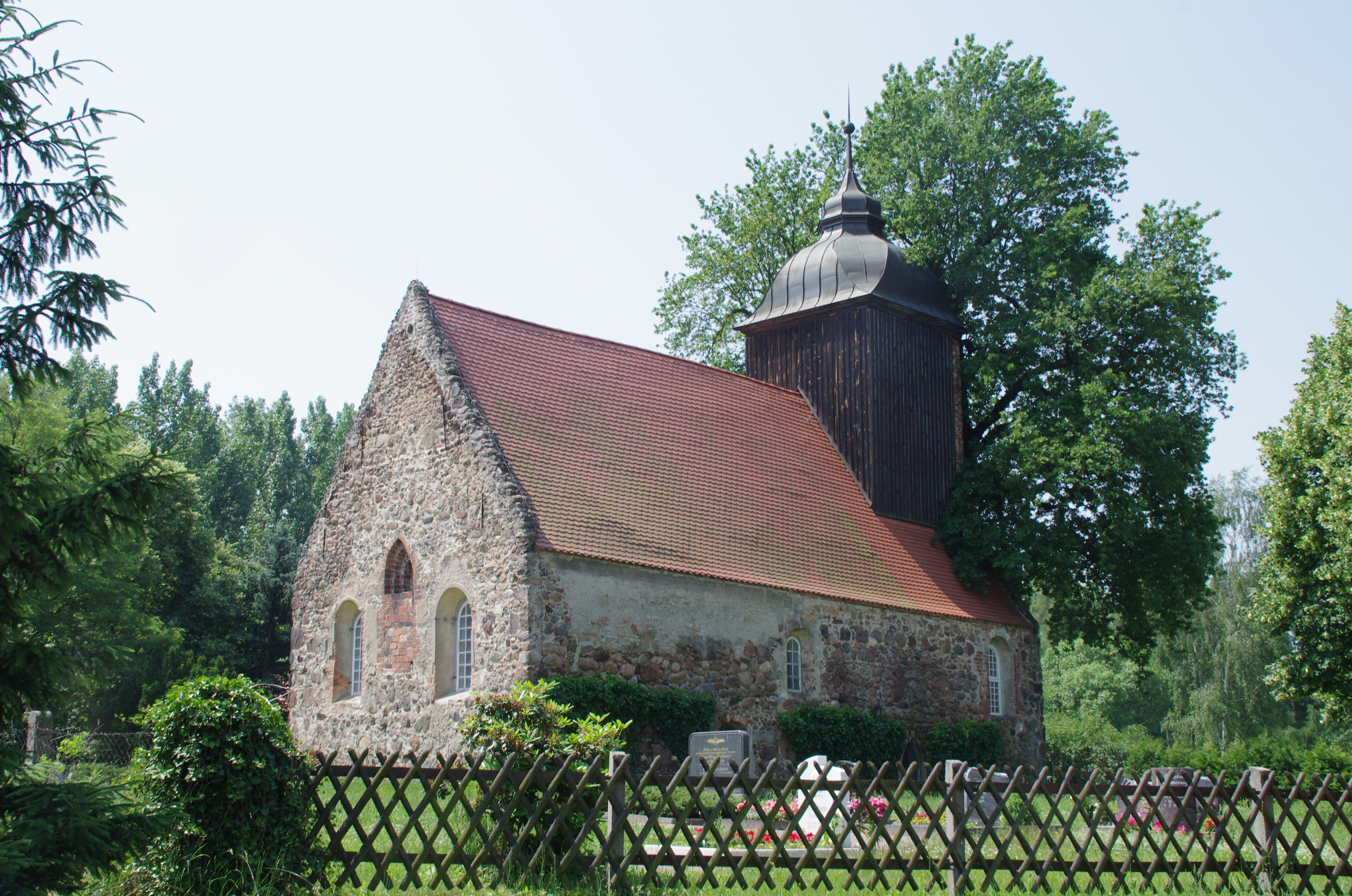 Luckau in Brandenburg. Die Kirche in Egsdorf steht unter Denkmalschutz.